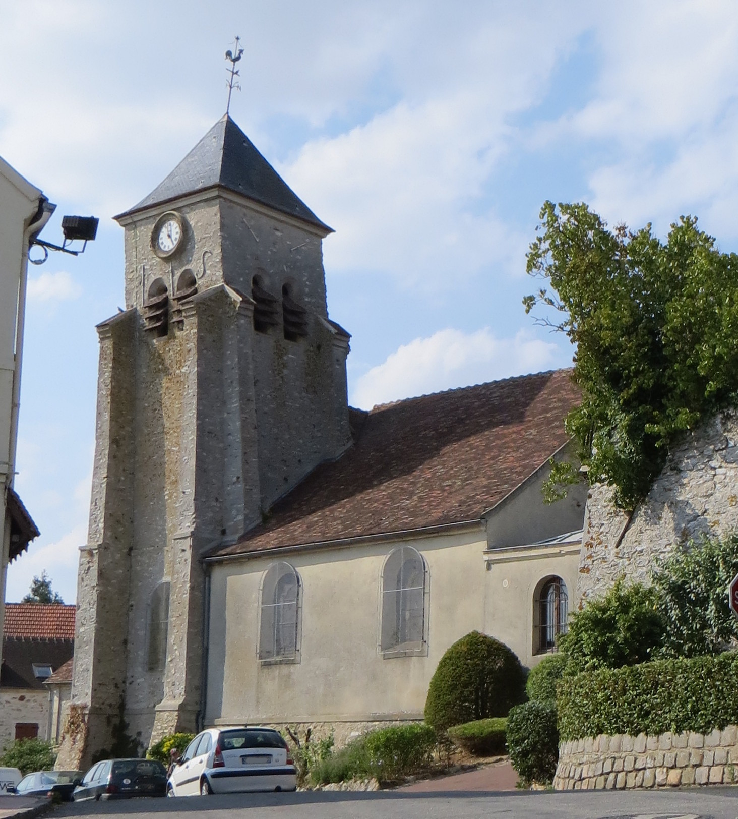 Vue de l'église